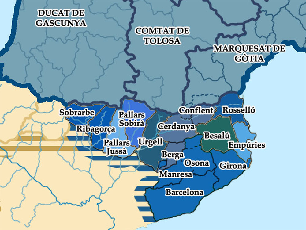 Territoris del migdia francès i sudpirinencs el 1017